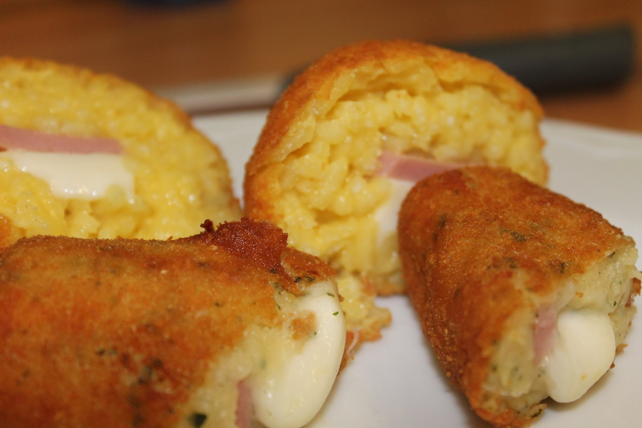 De Gregorio Gennaro, Crocchè o anche panzarotti farciti.